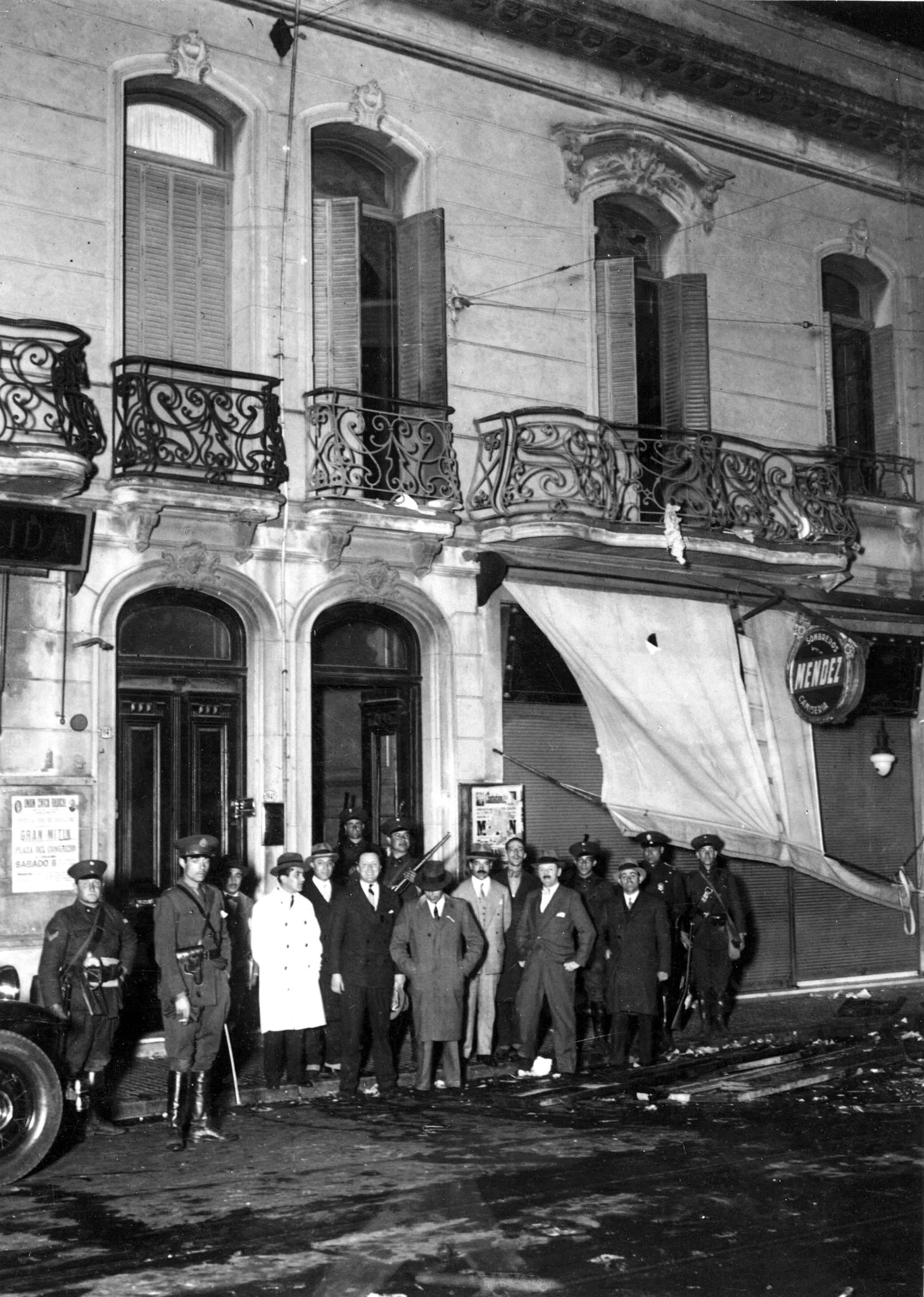 Buenos Aires. Golpe del 30. Guardias y público frente a la casa del depuesto Presidente constitucional Hipólito Yrigoyen, después del saqueo del que fue objeto. Documento fotográfico. Inventario 32758. Archivo General de la Nación Argentina